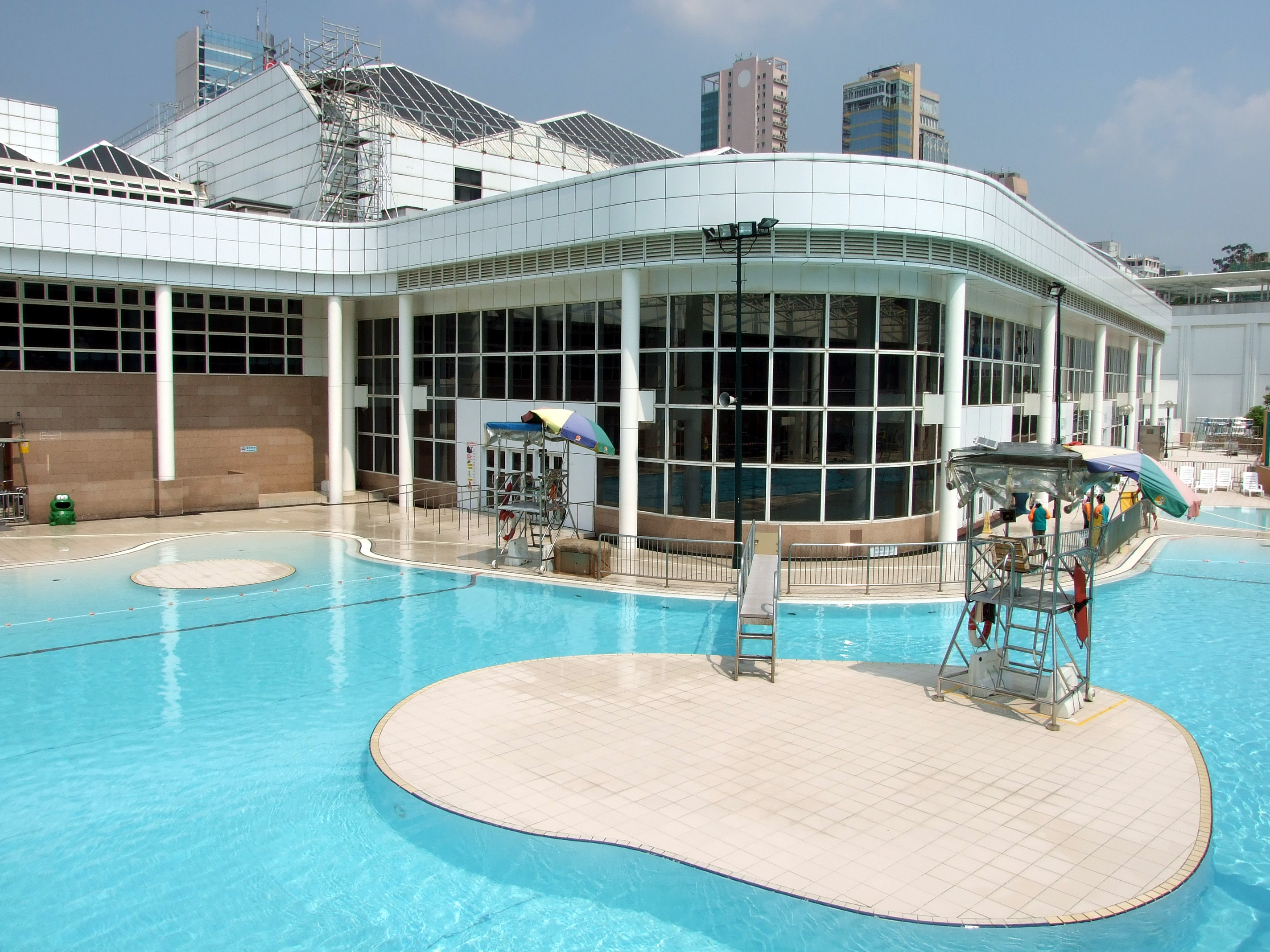 中文（香港）: 九龍公園游泳池